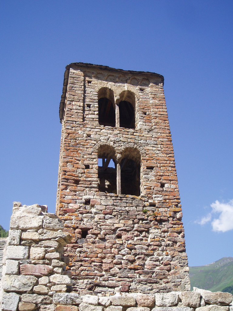 Clocher roman de l'église de Mérens-les-Vals (Ariège)